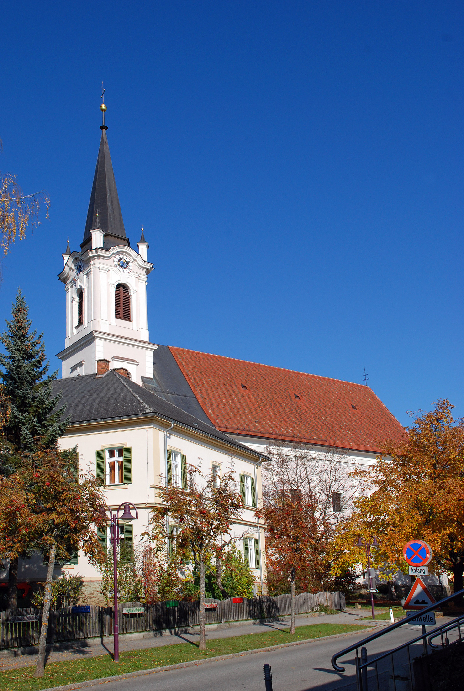 Pfarrkirche Bad Gams, Steiermark, Österreich, Südseite der Kirche, im Vordergrund der Pfarrhof Object location46° 52′ 10.96″ N, 15° 13′ 21.04″ E